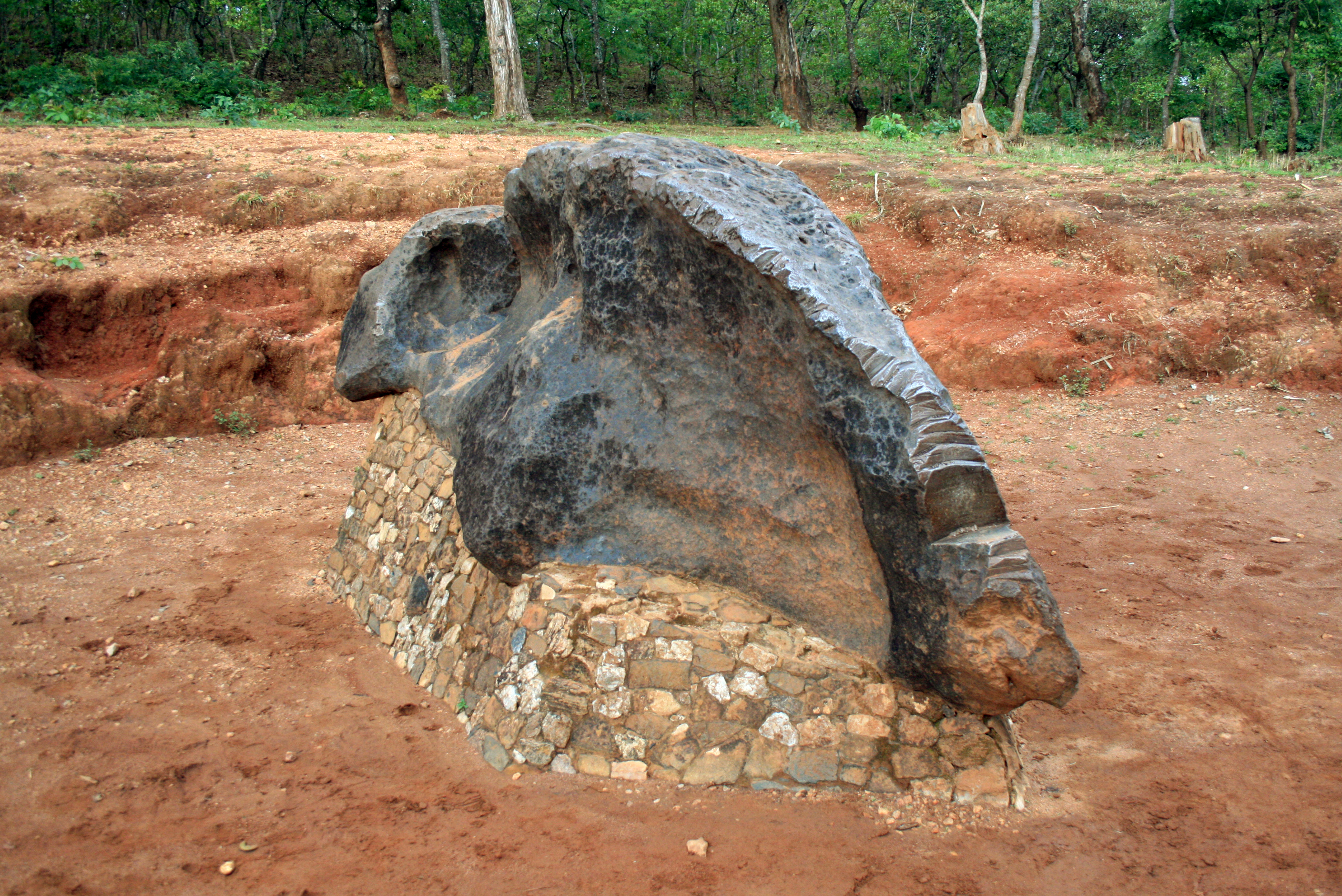 Mbozi meteorite (2010), Mbeya, Tanzania.